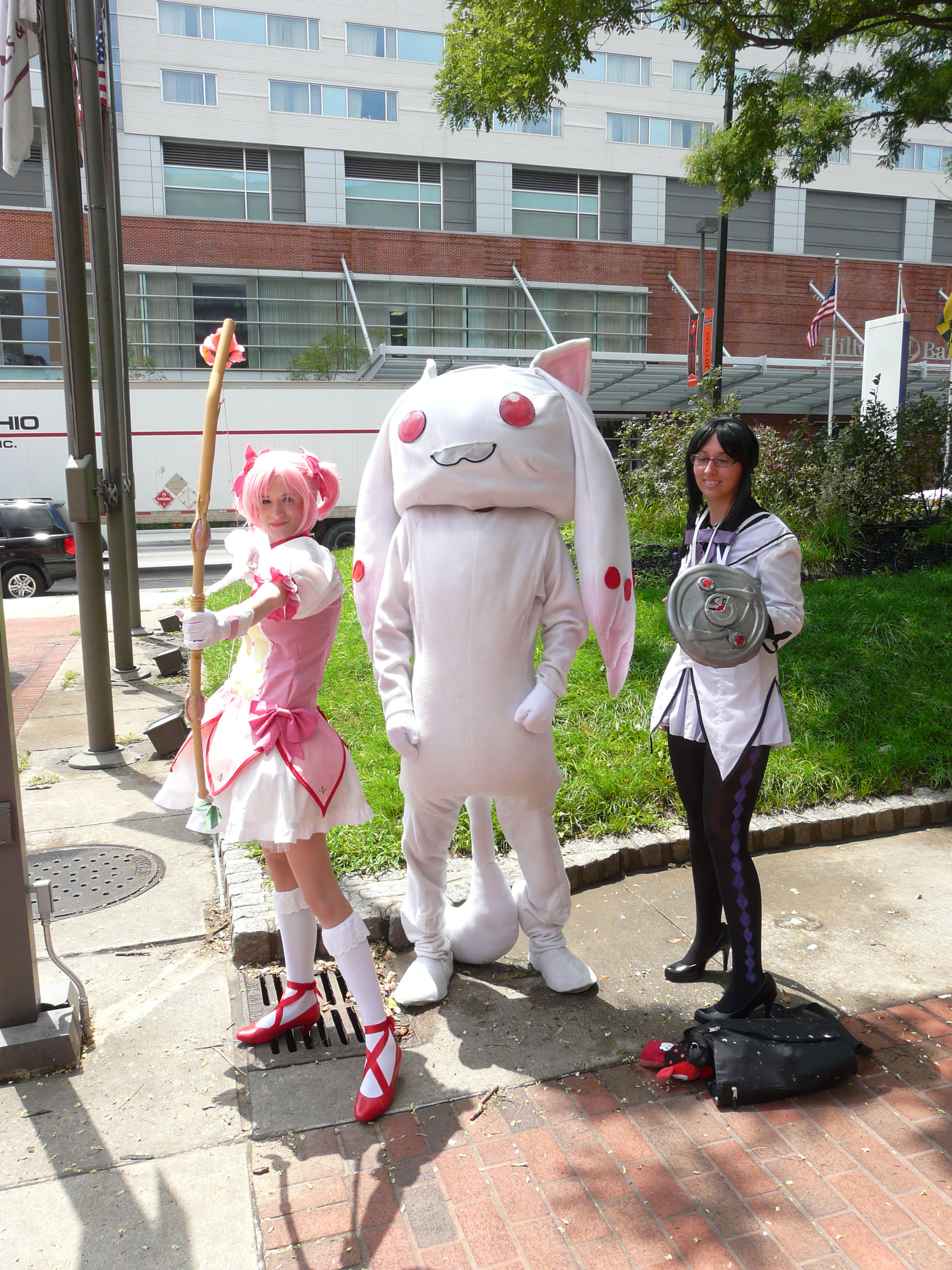 Otakon 2012 cosplay of Puella Magi Madoka Magica.